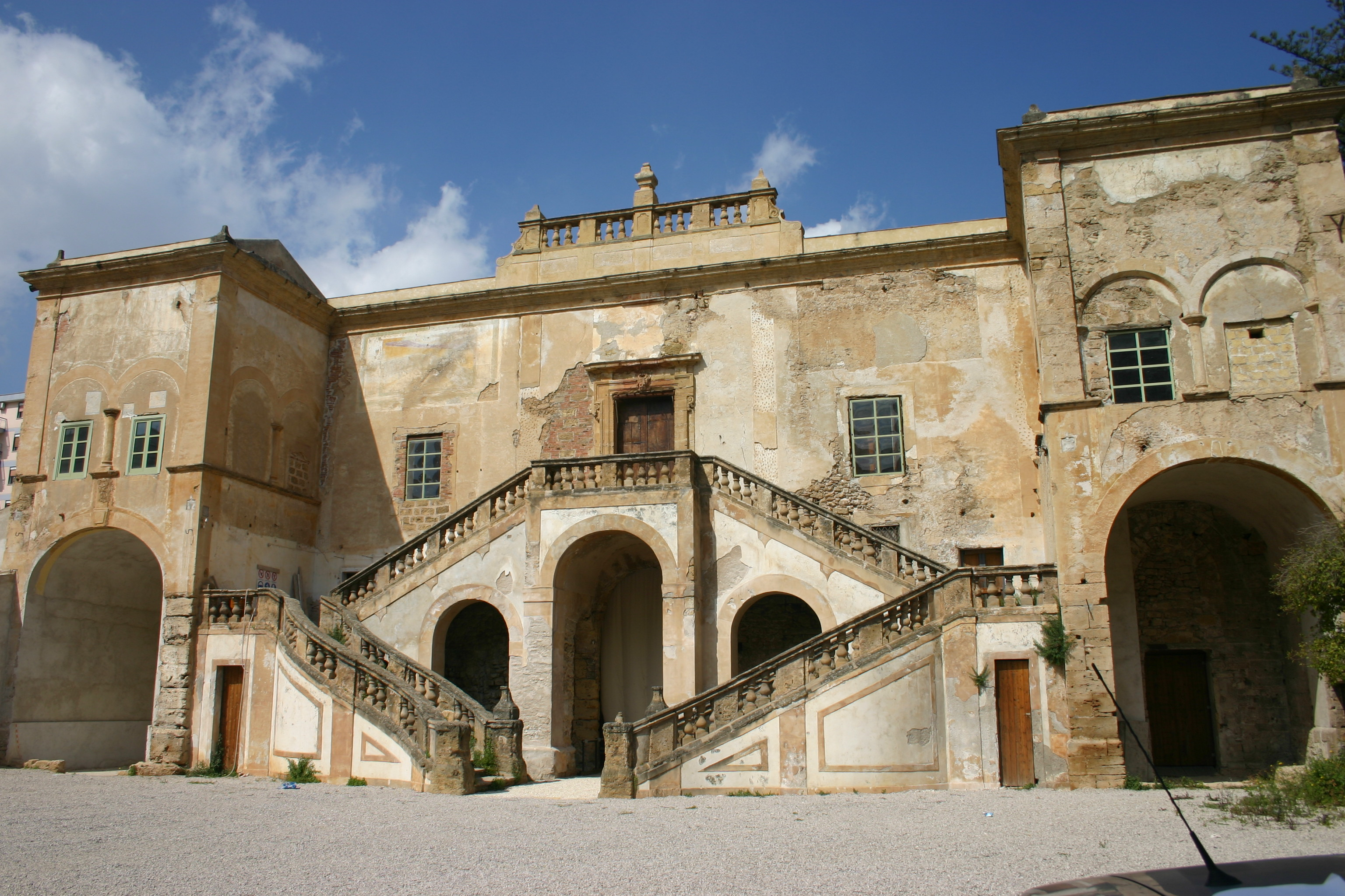 Palermo